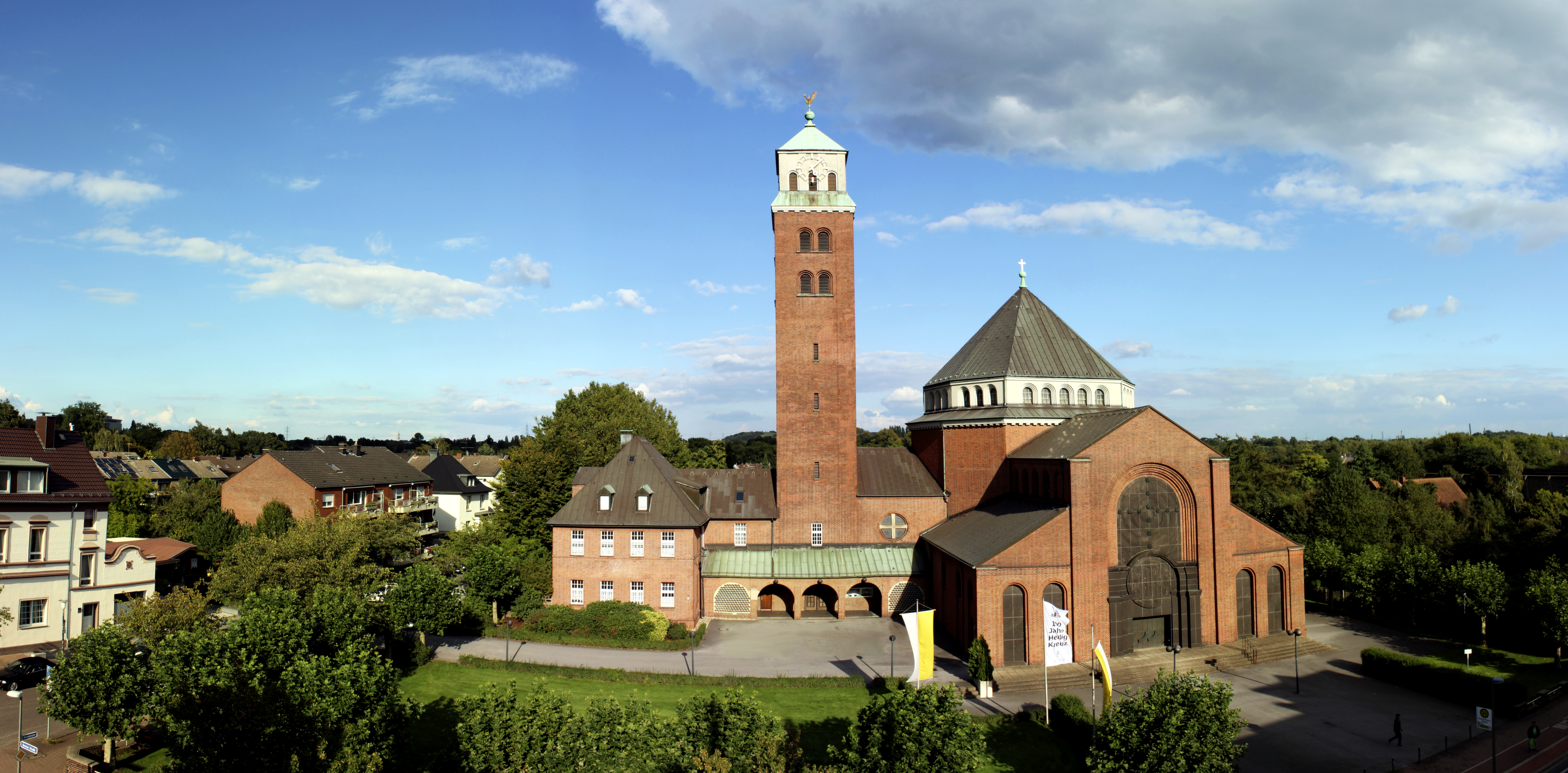 Ansicht auf die Westfassade der Heilig Kreuz-Kirche.